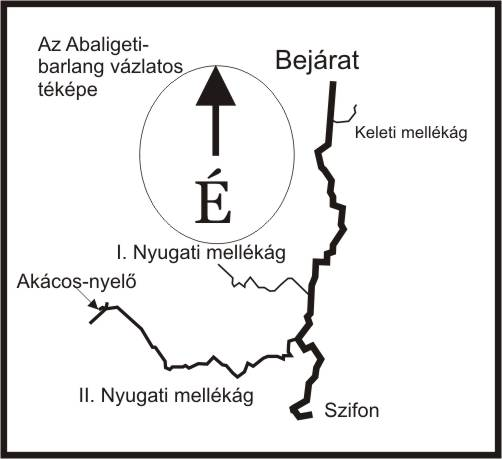 Az abaligeti barlang kézzel rajzolt, vázlatos térképe